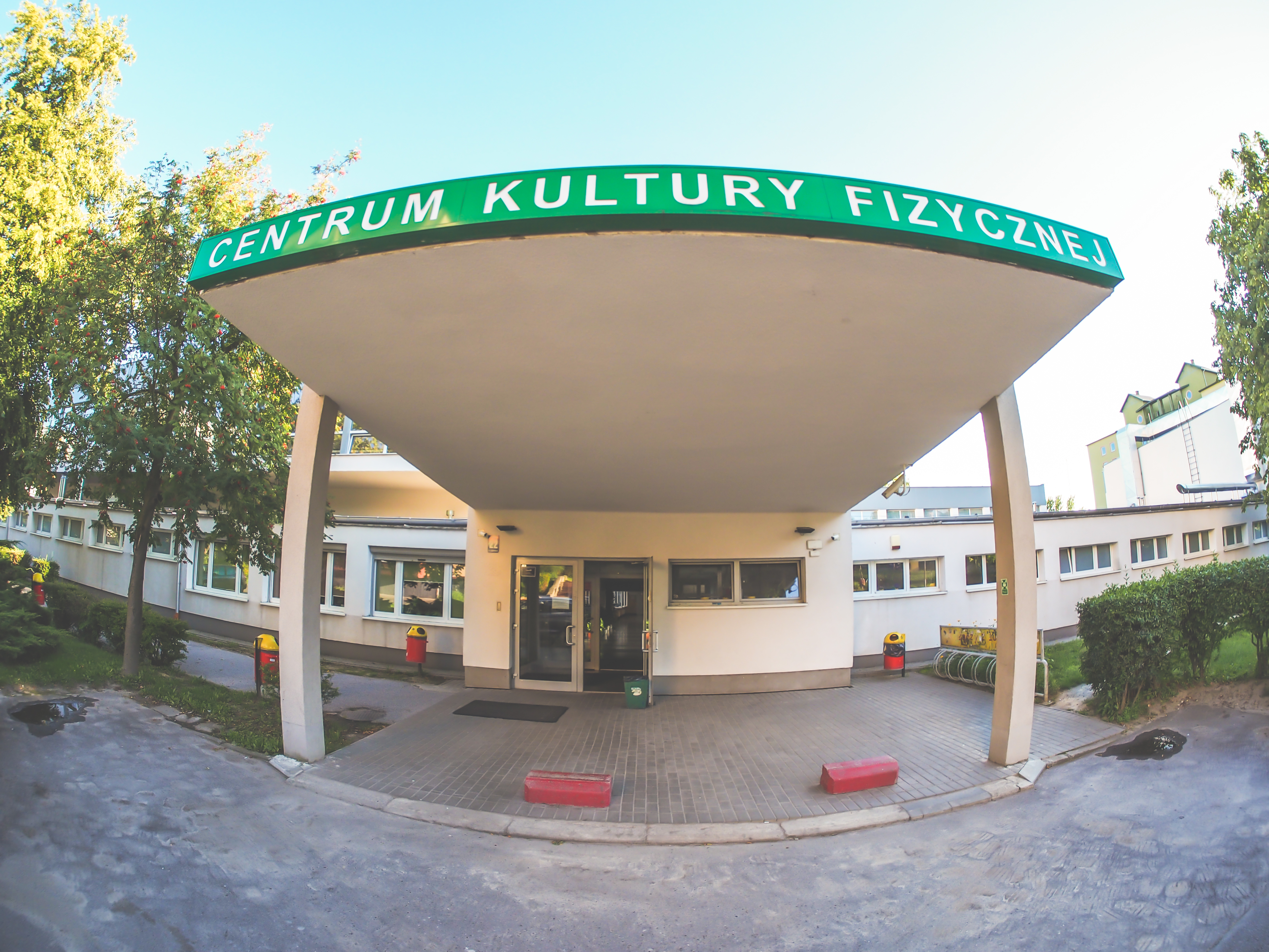 Zdjęcie przedstawia Budynek Centrum Kultury Fizycznej UMCS